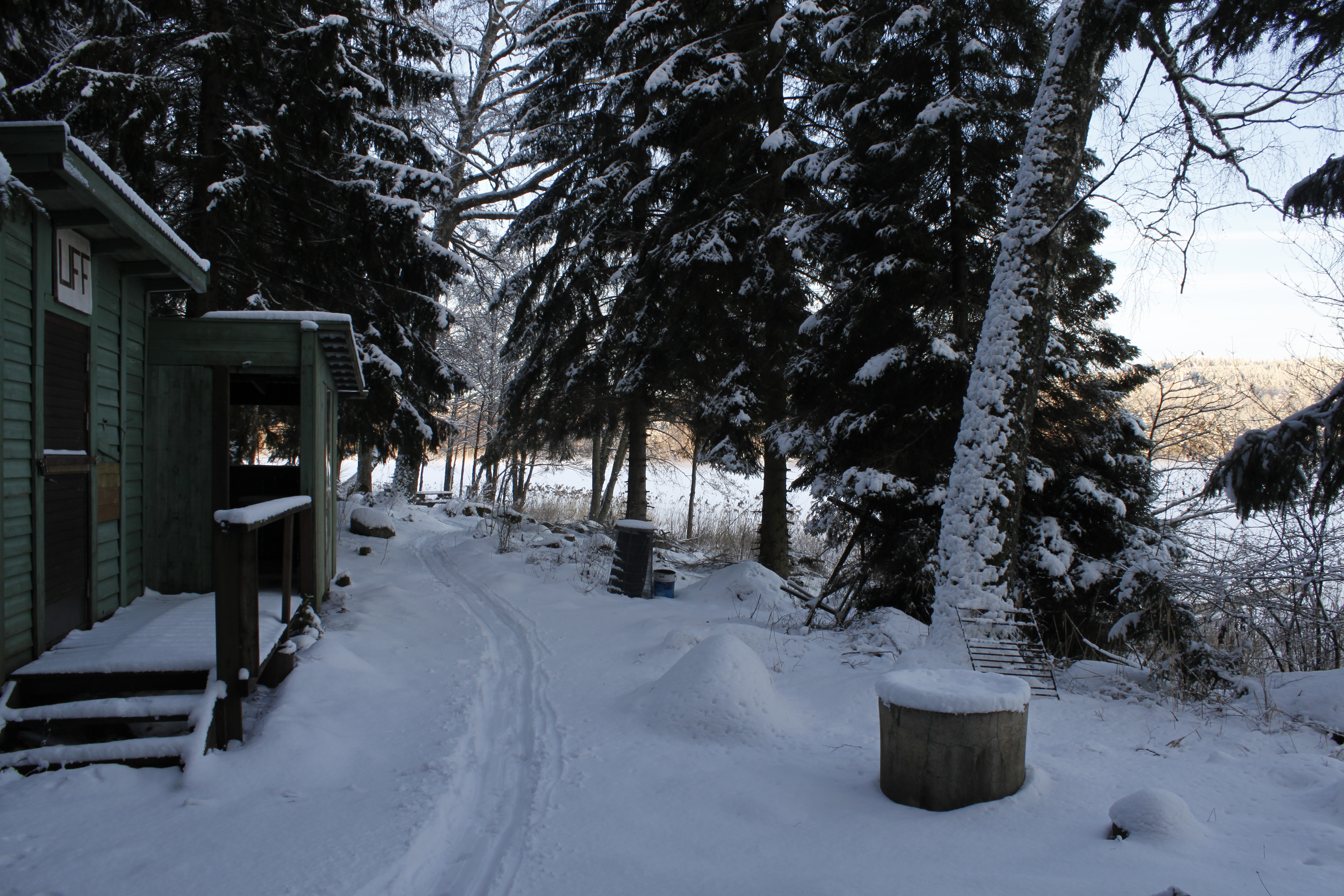 Detta är stugan vid Röstesjön. Röstesjön ligger vid riksväg 40 i Ulricehamns kommun.